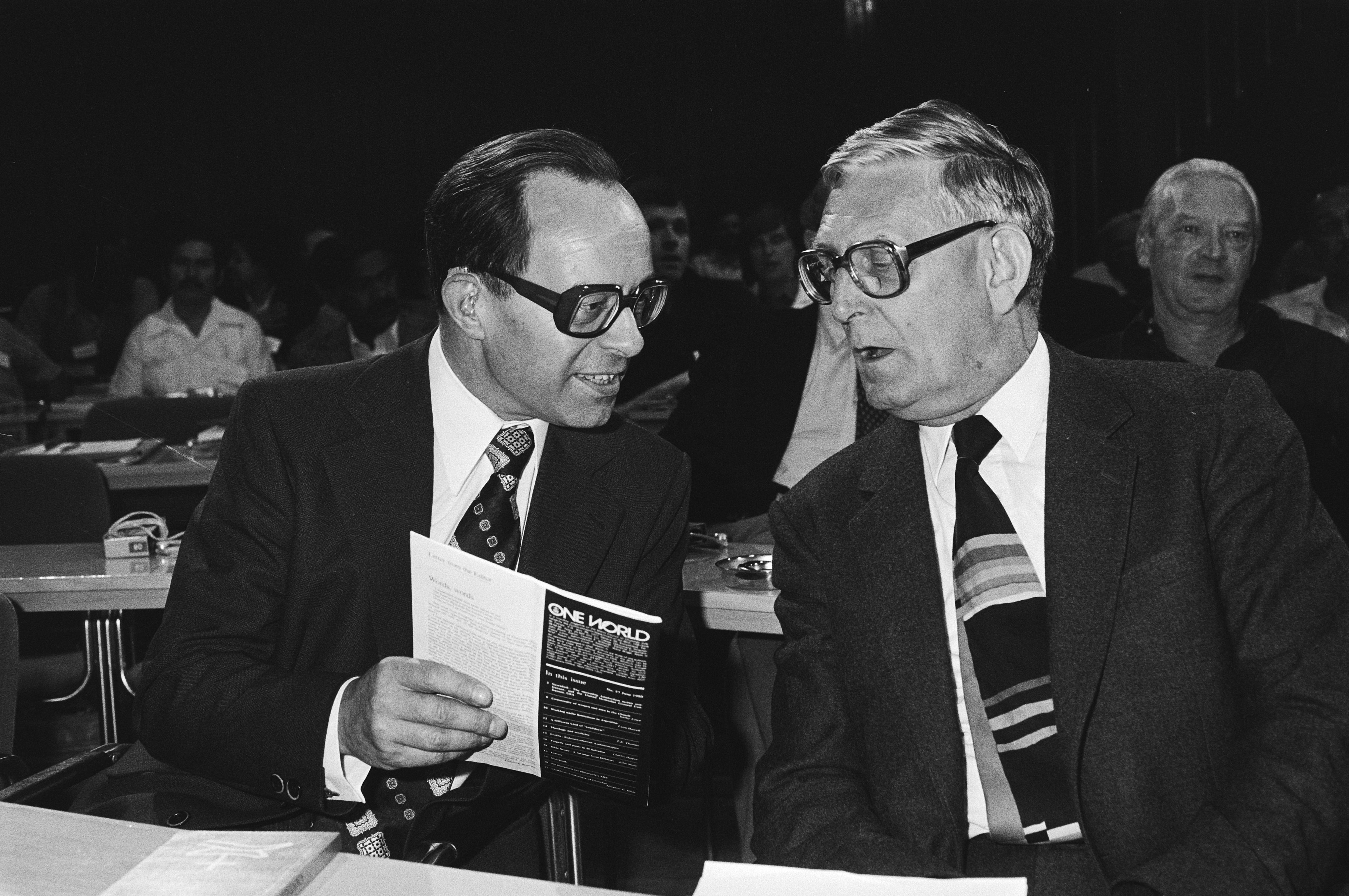 Collectie / Archief : Fotocollectie Anefo Reportage / Serie : [ onbekend ] Beschrijving : conferentie Wereldraad van Kerken Noordwijkerhout dr. H. Fiolet (l) (secr. Raad van Kerken Nederland) prof. H. Berkhof ( Raad van Kerken Nederland) Datum : 16 juni 1980 Locatie : Noordwijkerhout, Zuid-Holland Trefwoorden : KERKEN, conferenties Fotograaf : Pereira, Fernando / Anefo Auteursrechthebbende : Nationaal Archief Materiaalsoort : Negatief (zwart/wit) Nummer archiefinventaris : bekijk toegang 2.24.01.05 Bestanddeelnummer : 930-8792